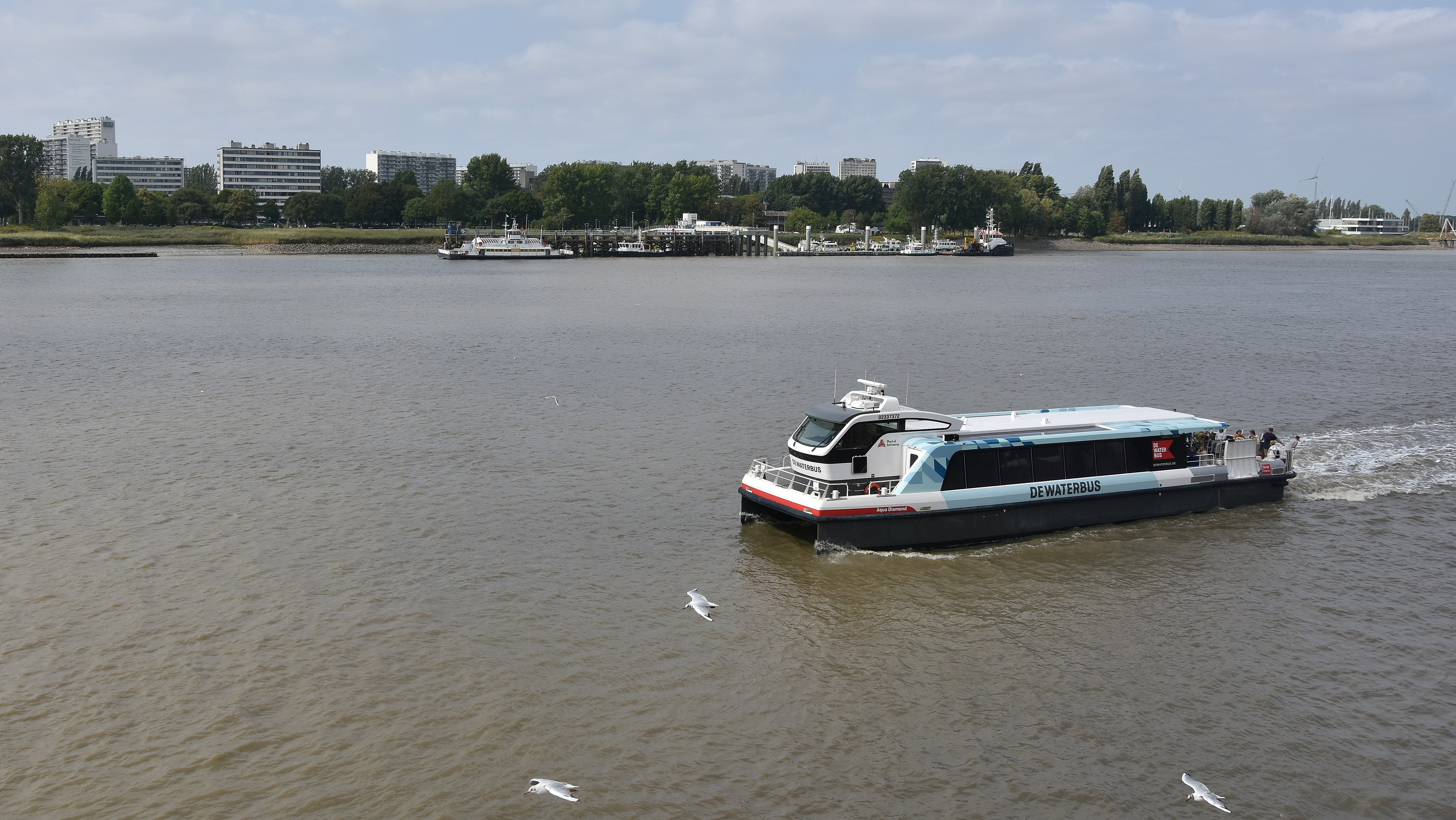 DeWaterbus op de Schelde te Antwerpen 19-08-2018